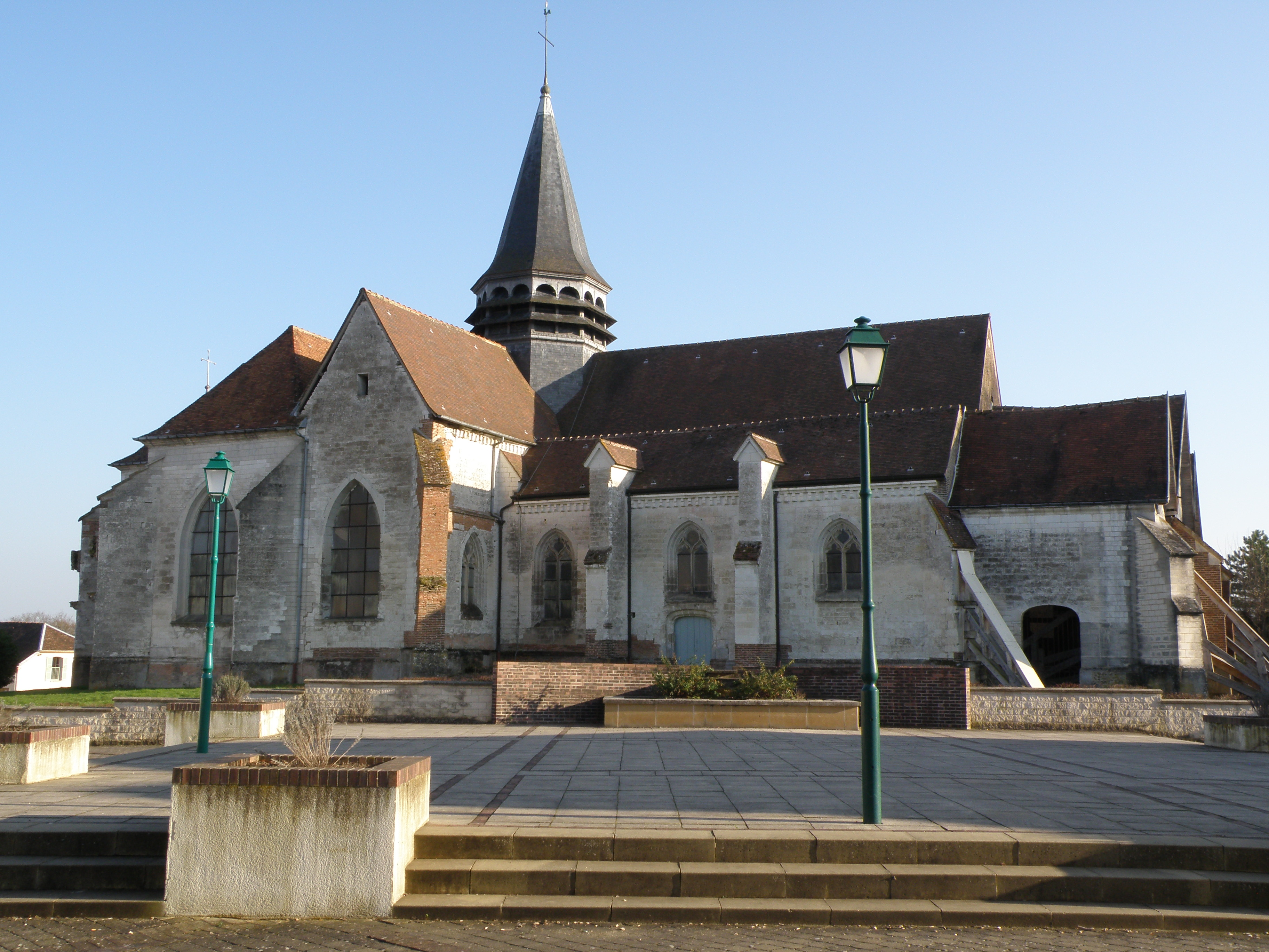 Eglise Saint-Laurent. 10320 Bouilly